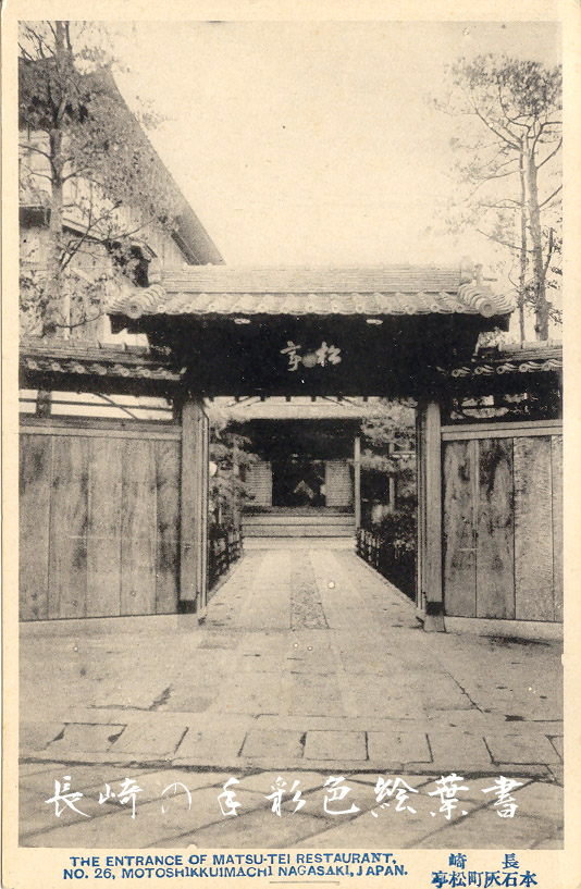 長崎 卓袱 料亭 松亭 手彩色絵葉書長崎市本石灰町 1895年創業 2012年閉店